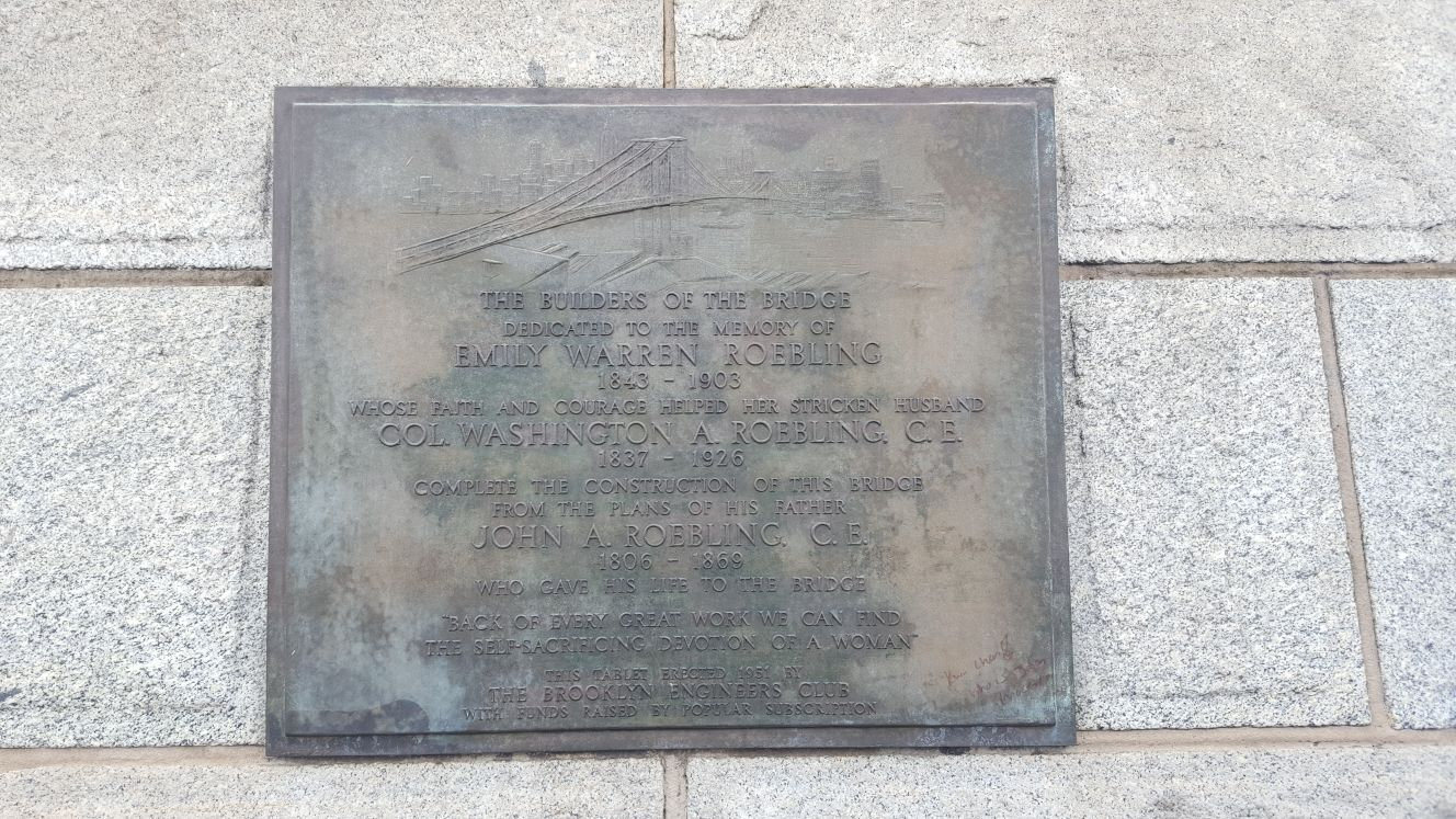 Emily Warren Roebling plaque, Brookling Bridge, New York City